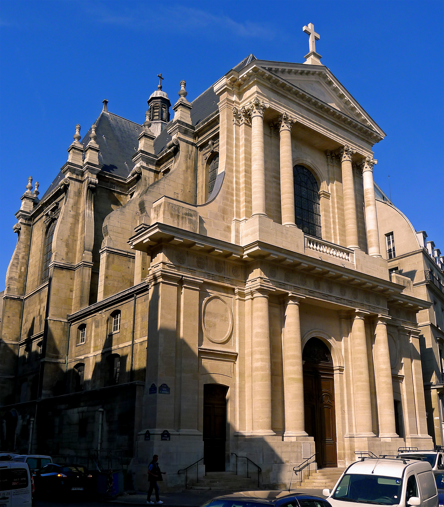 Temple de l'Oratoire du Louvre (Classé) .